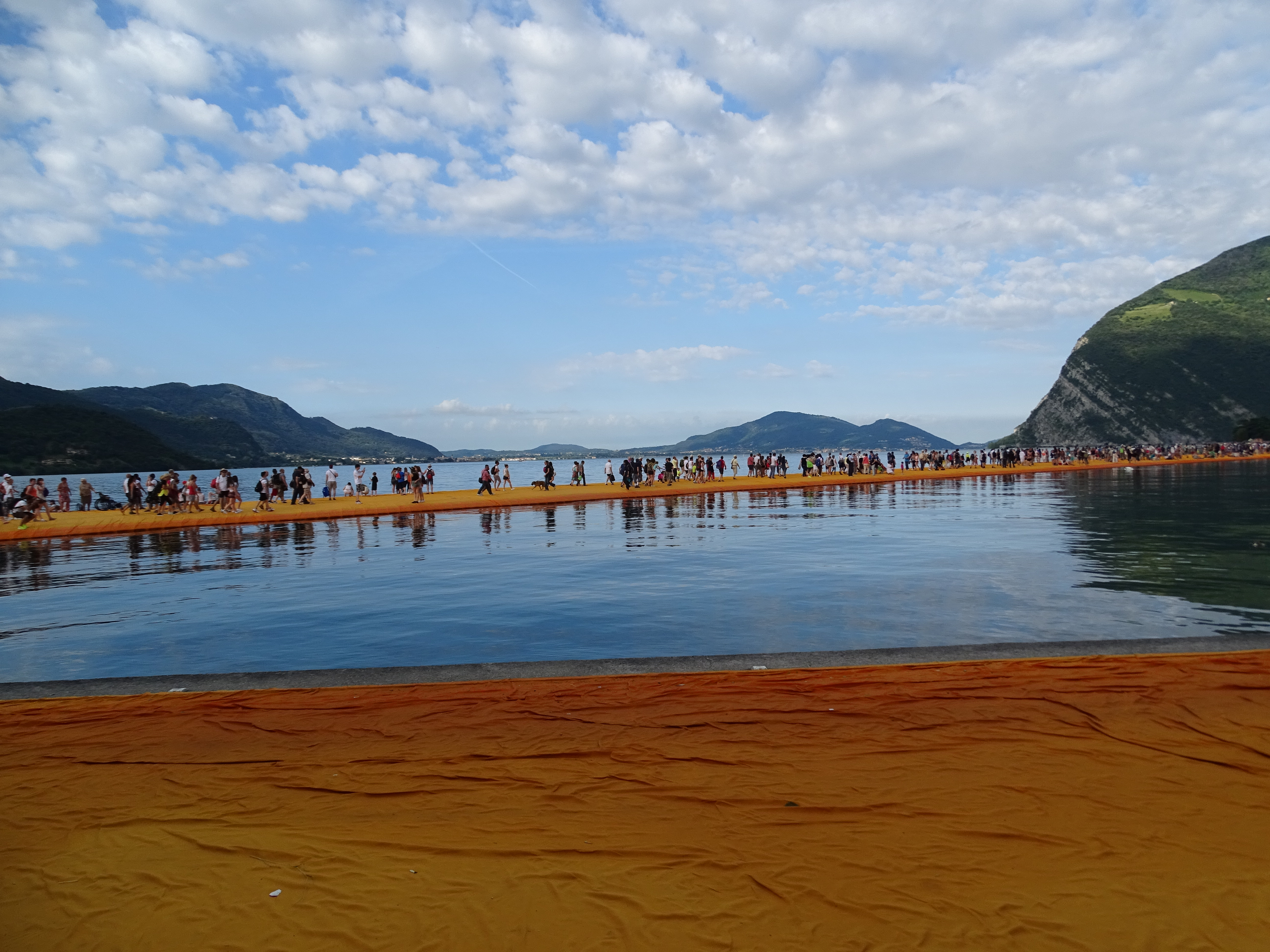 The Floating Piers, Christo, 2016